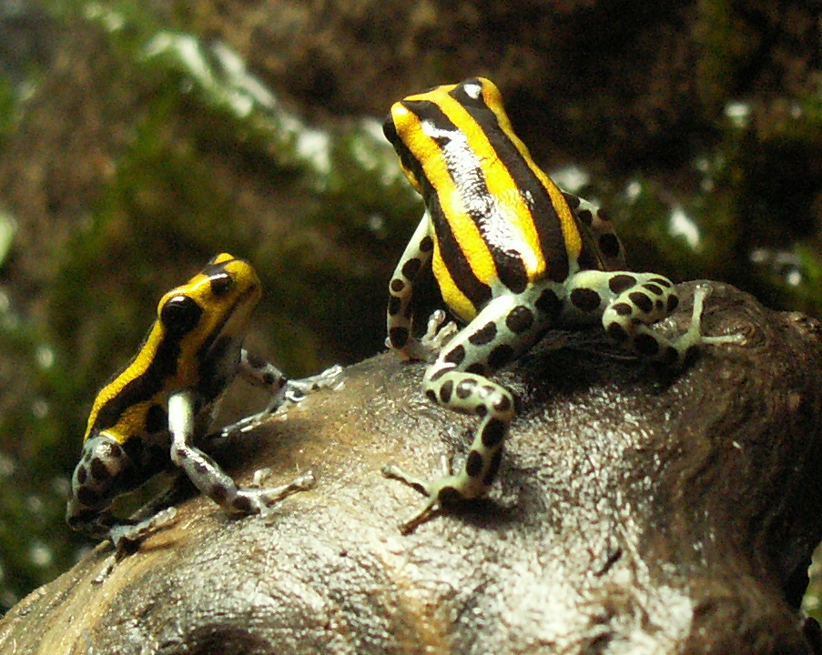 photo prise en terrarium d'un couple reproducteur de grenouille de l'espèce Ranitomeya lamasi